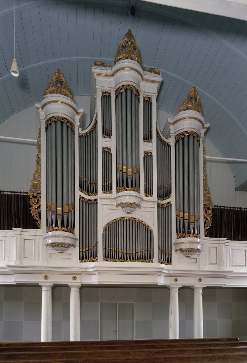 Nederlands Hervormde Kerk: Interieur, aanzicht orgel, orgelnummer 625 (opmerking: Gefotografeerd voor Het Historische Orgel in Nederland 1858-1865)